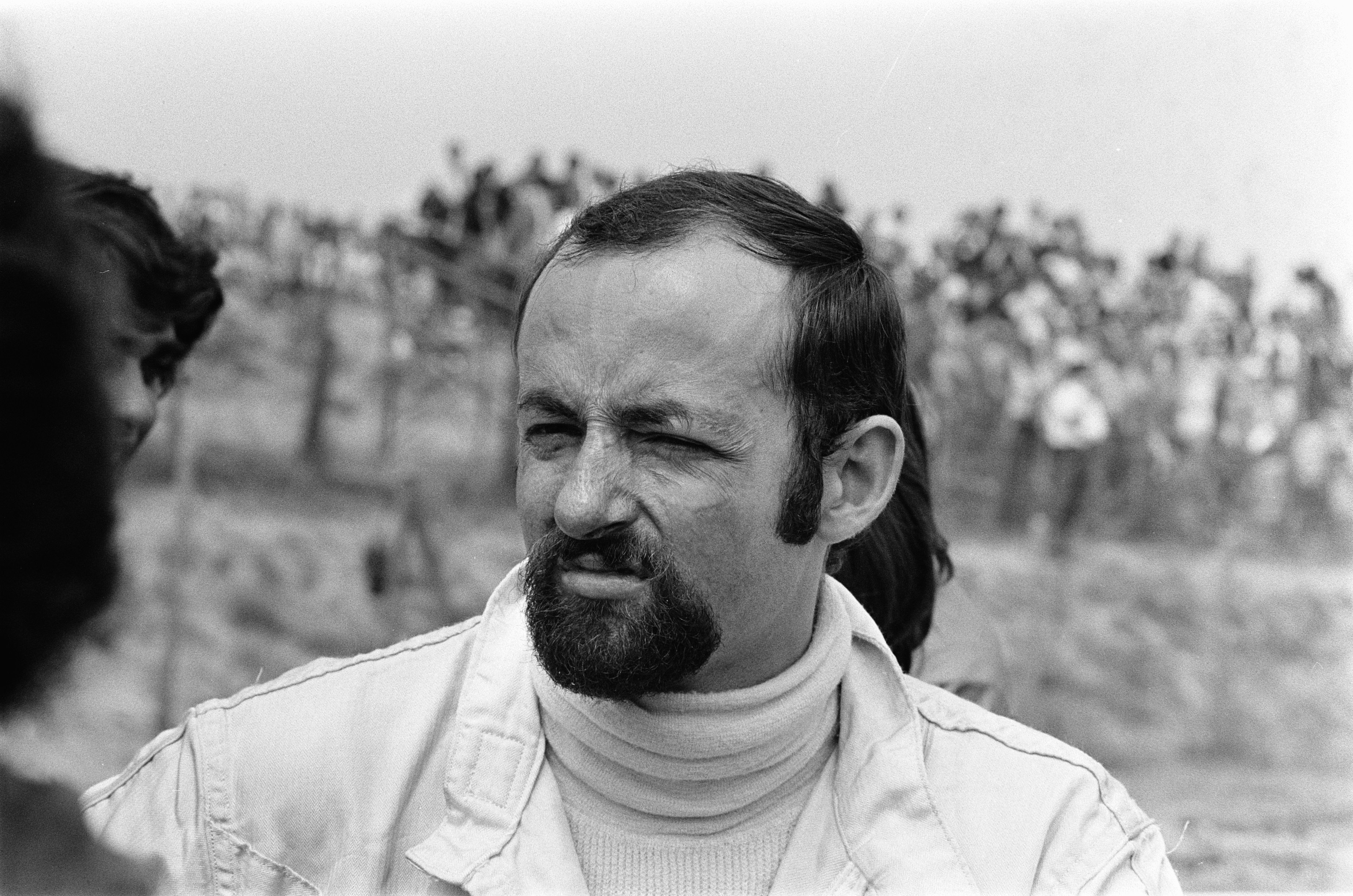 Collectie / Archief : Fotocollectie Anefo Reportage / Serie : Grand Prix Zandvoort 1970 Beschrijving : Grand Prix 1970 van Nederland voor Formule I wagens , Zandvoort; Henri Pescarolo Datum : 21 juni 1970 Locatie : Noord-Holland, Zandvoort Trefwoorden : autosport, portretten Persoonsnaam : Pescarolo, Henri Fotograaf : Evers, Joost / Anefo Auteursrechthebbende : Nationaal Archief Materiaalsoort : Negatief (zwart/wit) Nummer archiefinventaris : bekijk toegang 2.24.01.05 Bestanddeelnummer : 923-6113